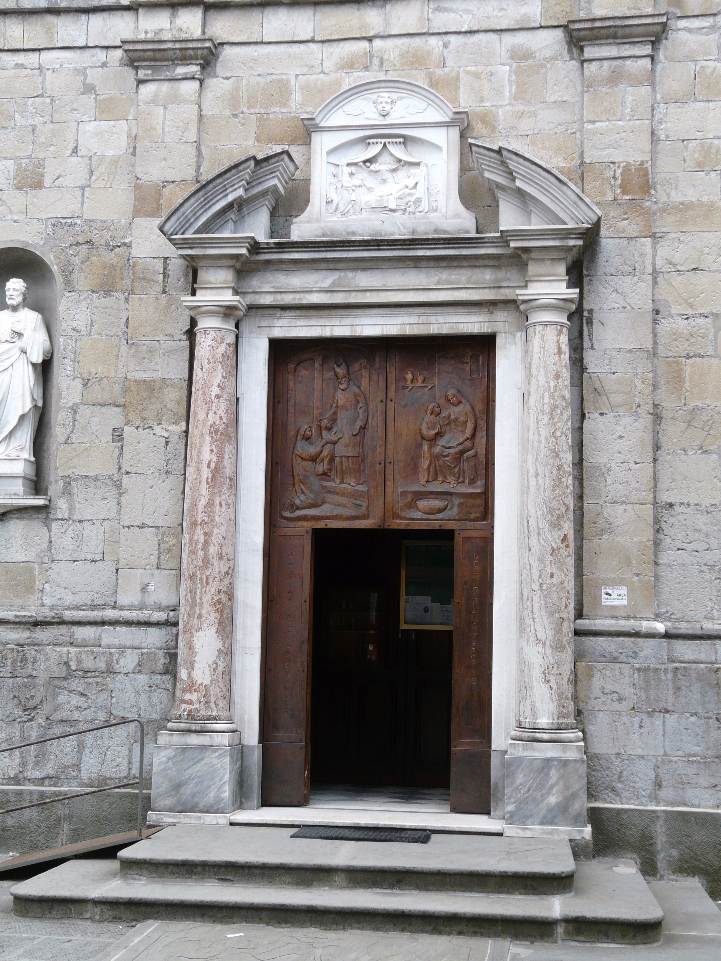 La chiesa di Santa Maria, Santa Maria del Taro, Tornolo, Emilia-Romagna, Italia